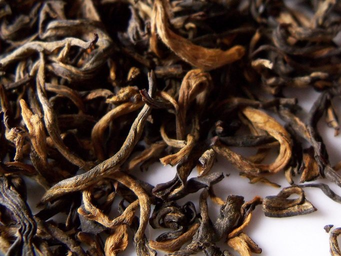 Yunnan Jig (close-up) 滇红